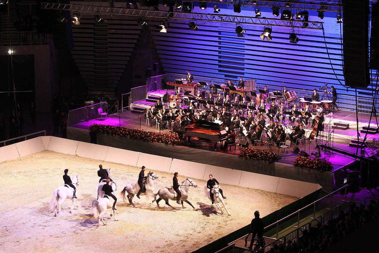 Lipica v Ljubljani, glasbeno-scenska predstava v Areni Stožice